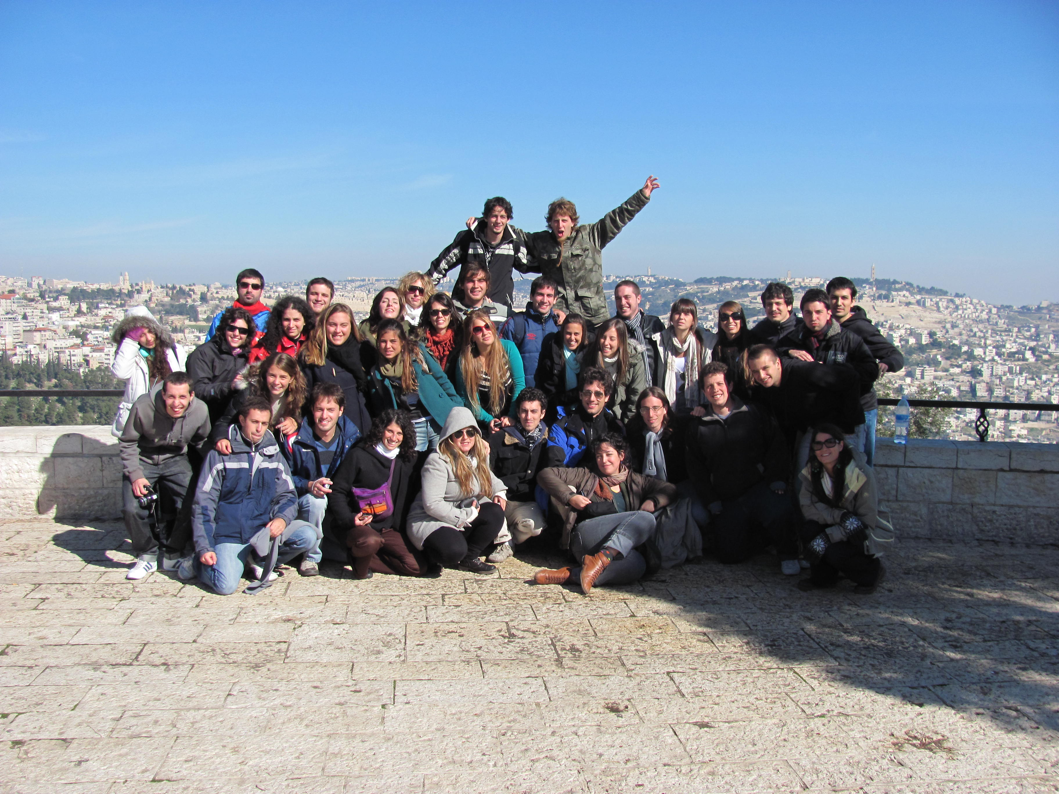 Un grupo de Taglit